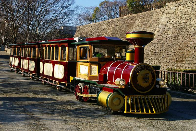 Park Train, Osaka Castle Park